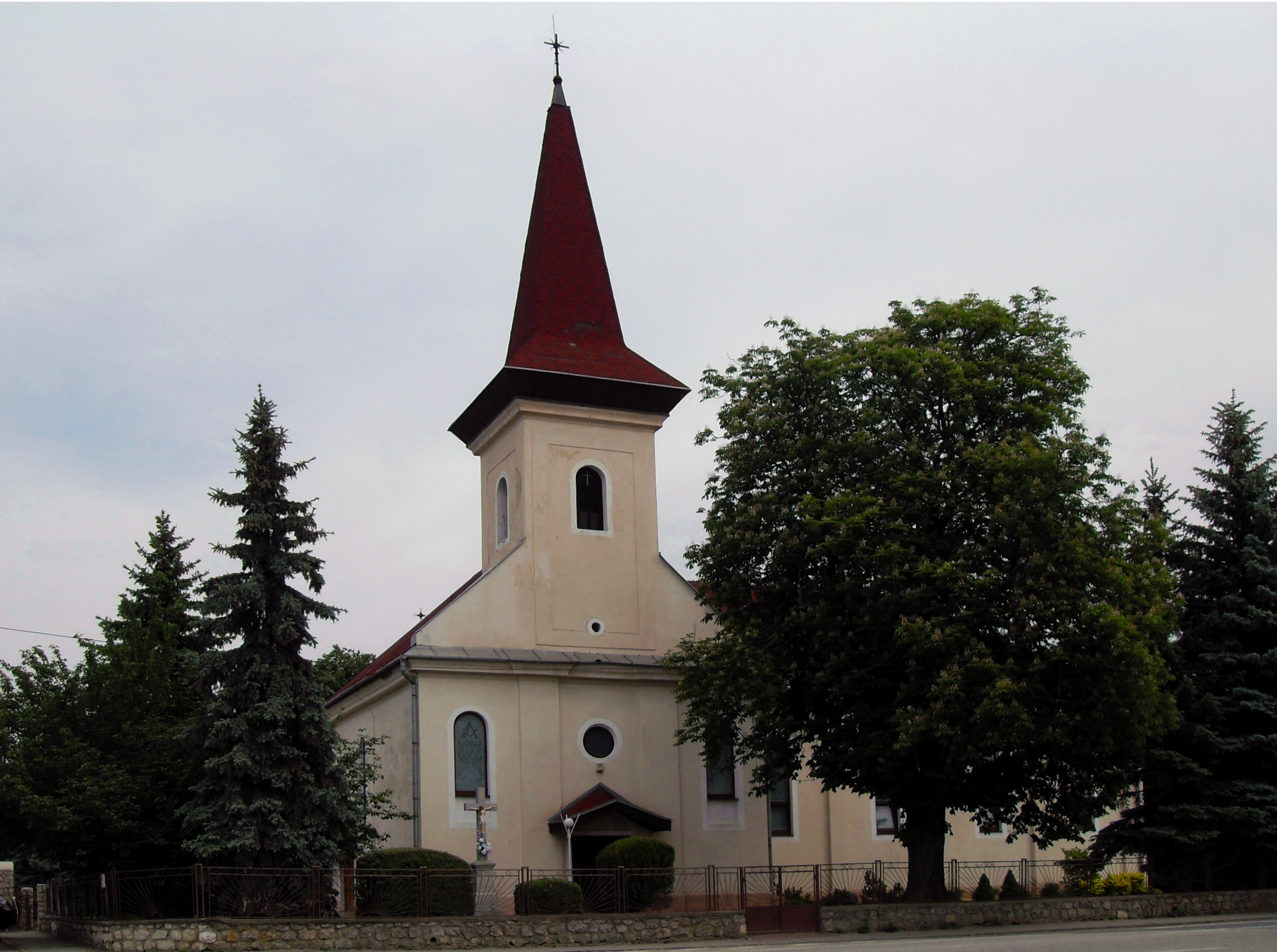 Čečejovce, Rímskokatolícky Kostol Svatý Jána Apoštola